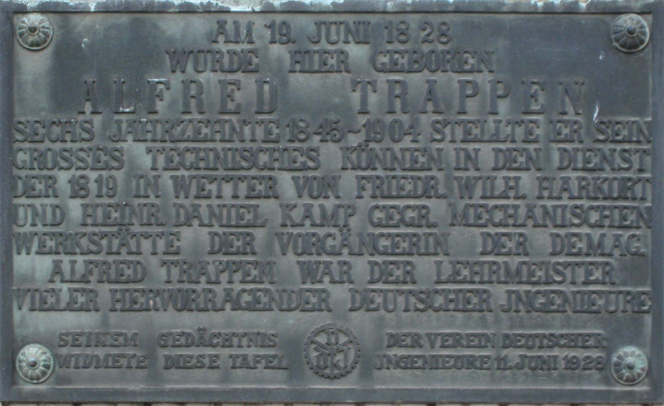 erinnerungstafel alfred trappen hoerde